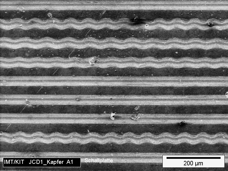 LP unter dem Mikroskop